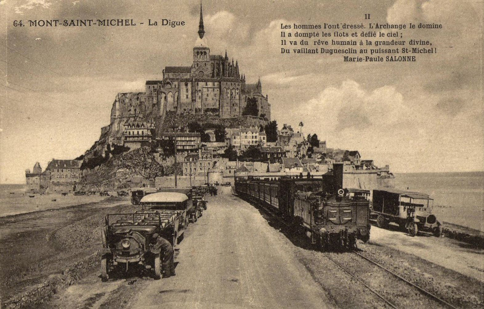 Vue d'une rame du tramway de la ligne de Pontorson au Mont-Saint-Michel en gare du Mont-Saint-Michel - Rame ouest composée d'une locomotive (type 120T série 1 à 150) et de voitures des Chemins de fer de l'Ouest.